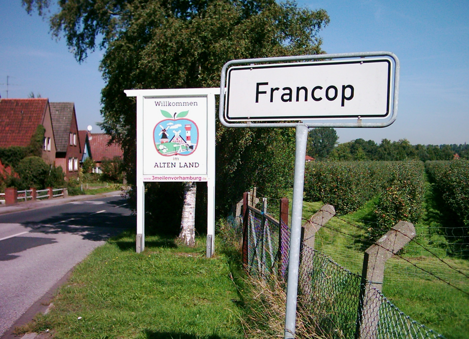 Willkommensschild Altes Land, Francop.